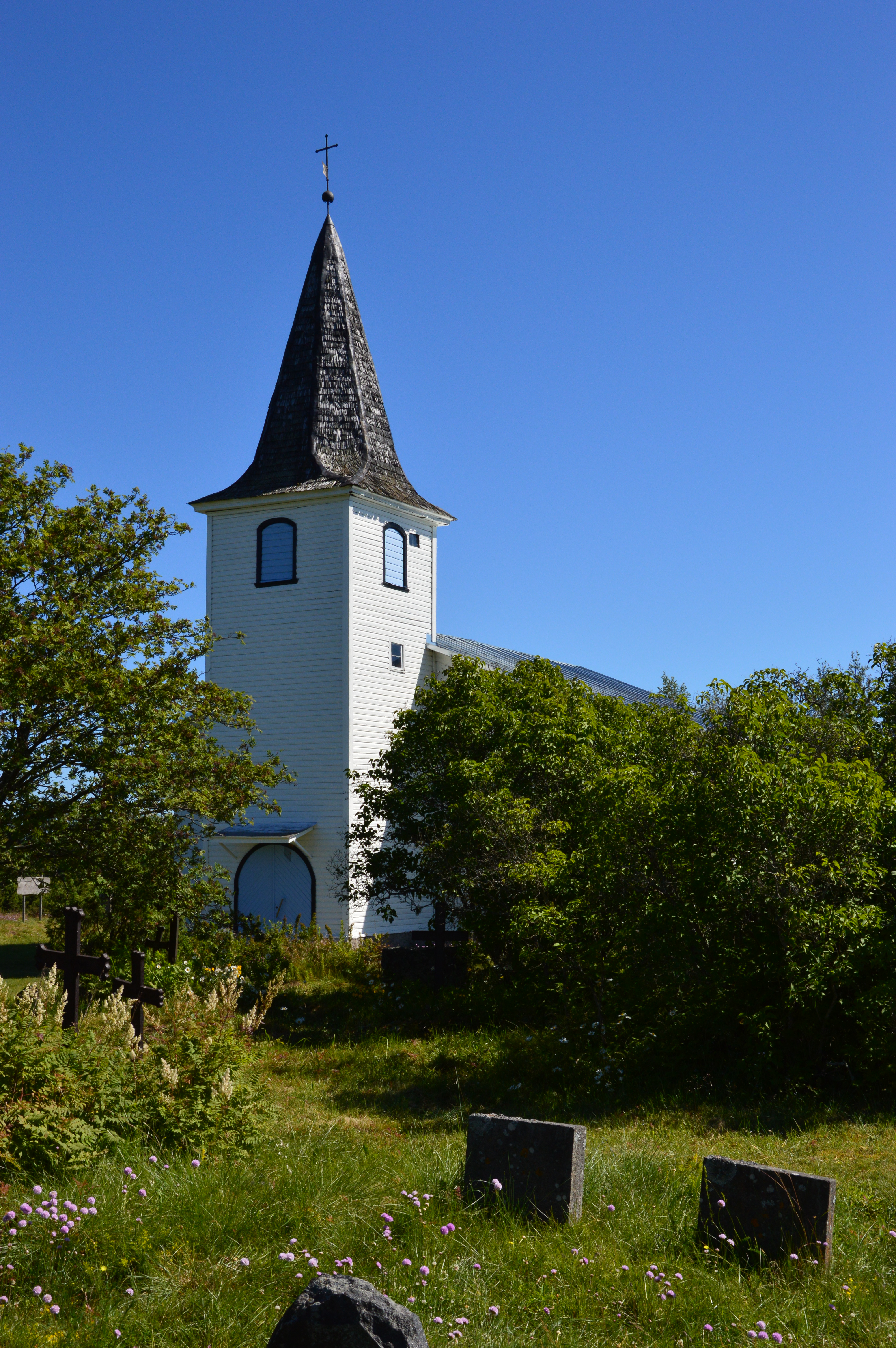 Prangli kirik